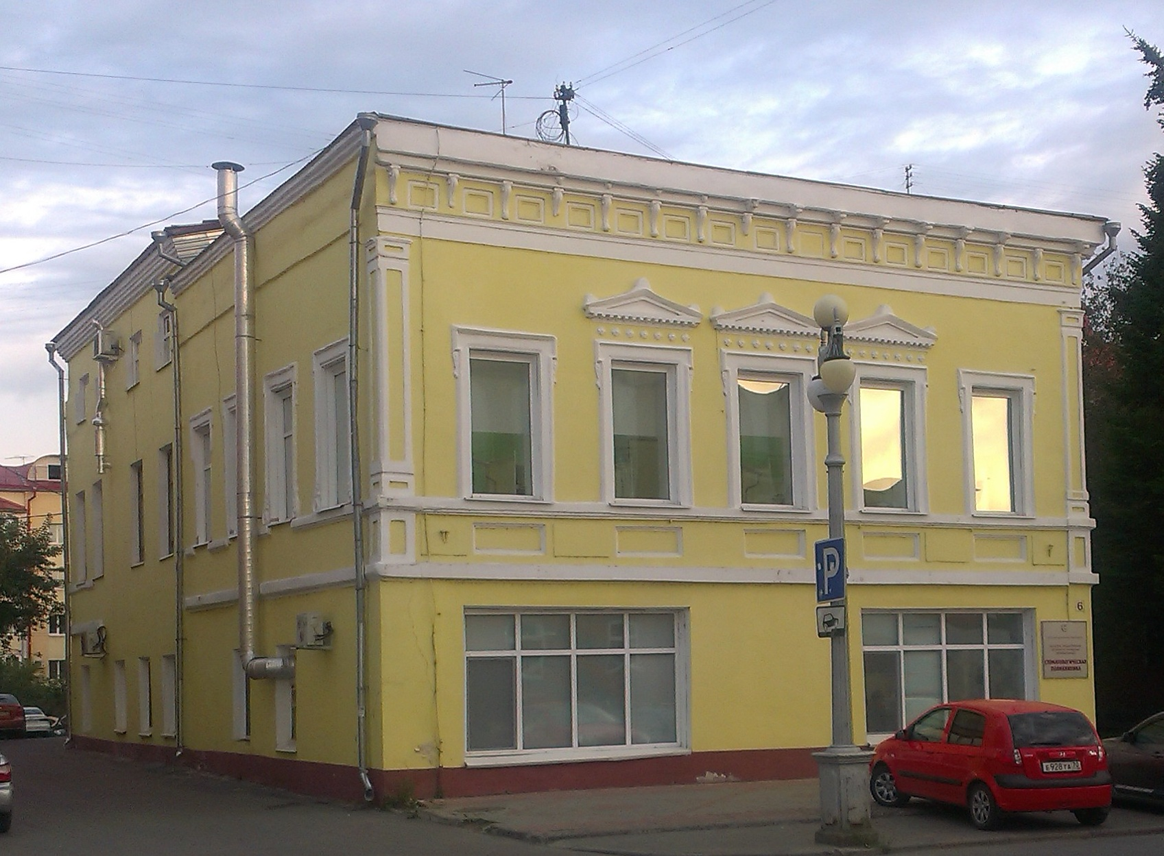 Дом Цибульского